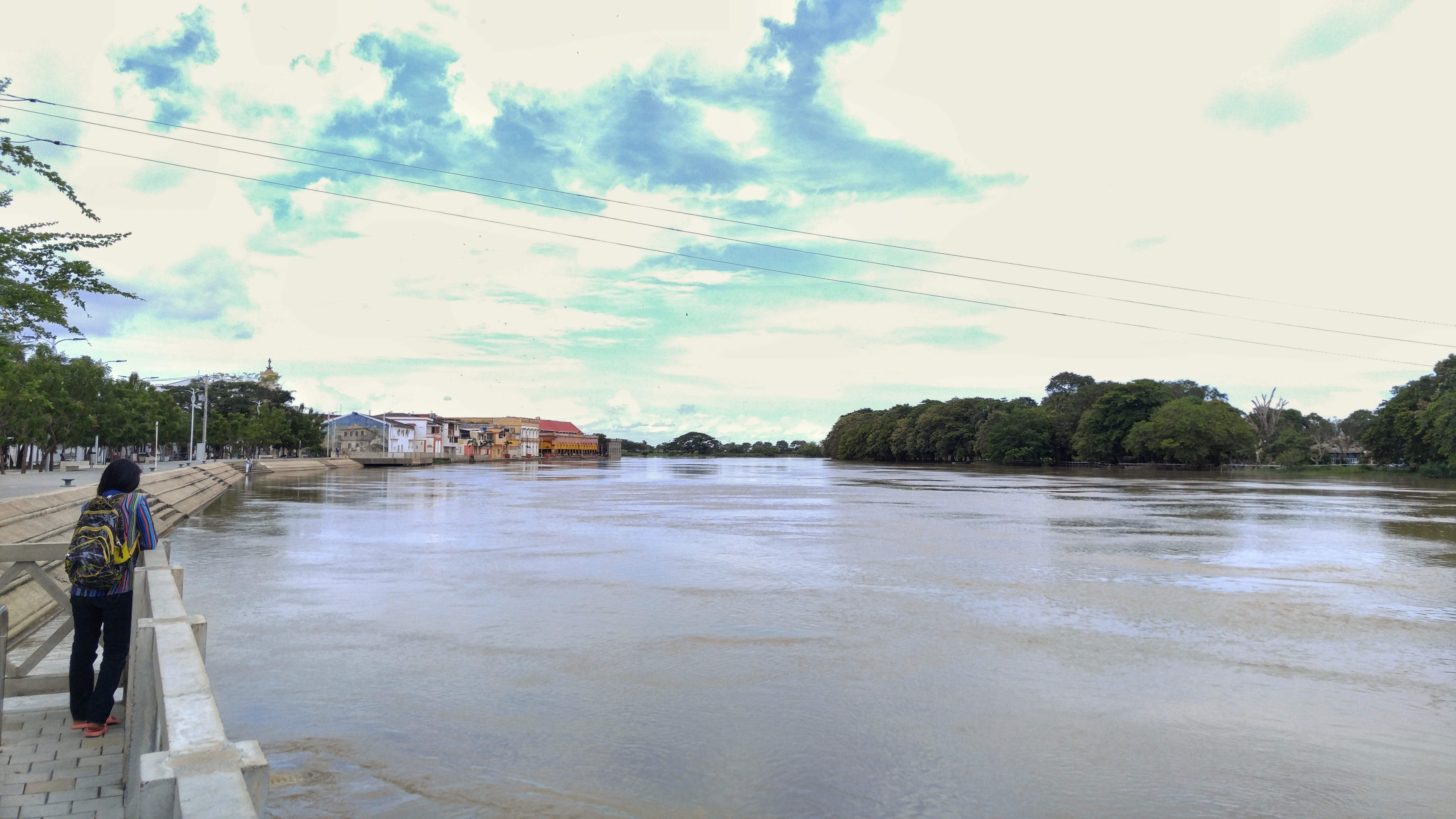 Representa una panorámica de uno de los ríos tutelares de Colombia. Y como todo río provee de vida a todas las poblaciones que irriga. Esta fotografía fue tomada en el municipio colombiano con código 23417.